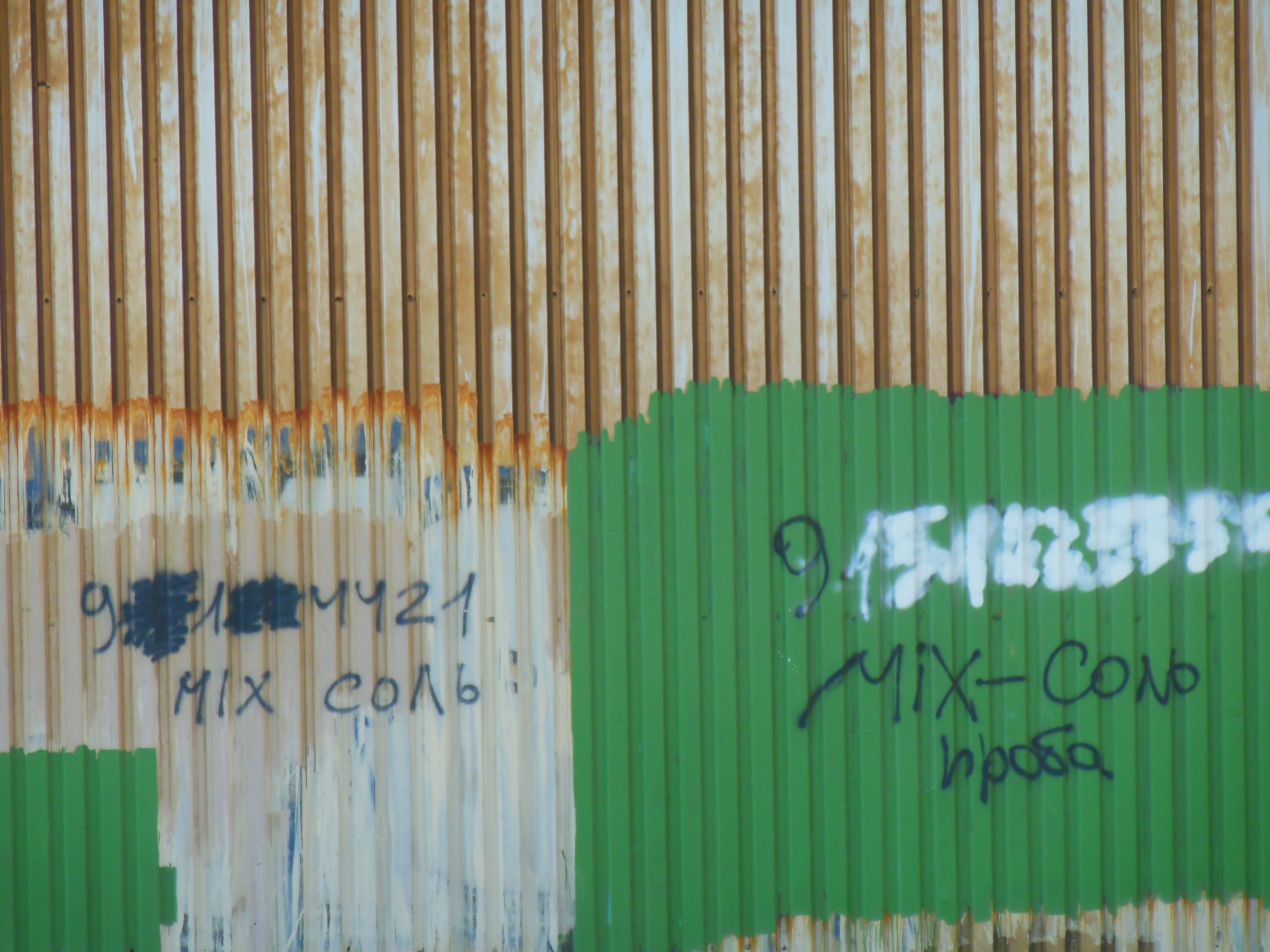 Граффити с рекламой наркотиков (солей для ванн, миксов) на заборе в Химках